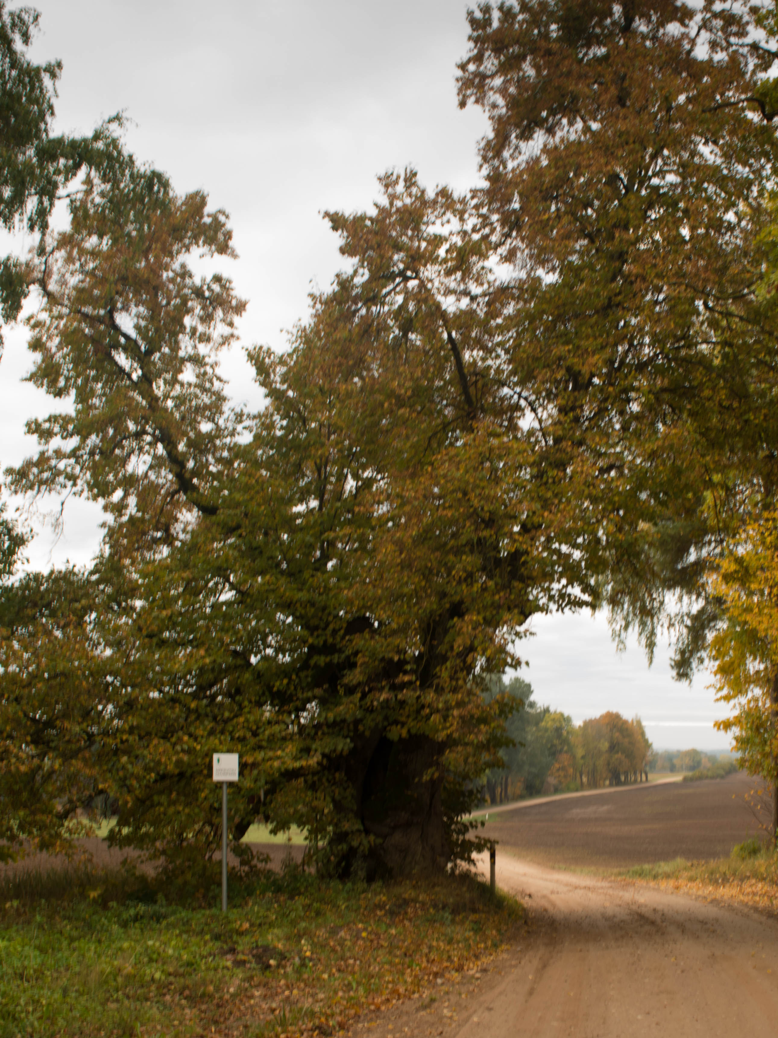 Ohvripärn